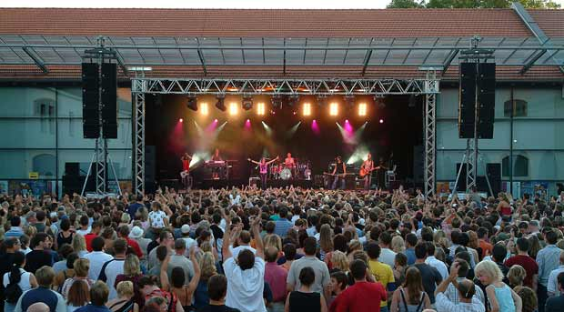 Stadtsaalhof, Bühnenansicht von aussen